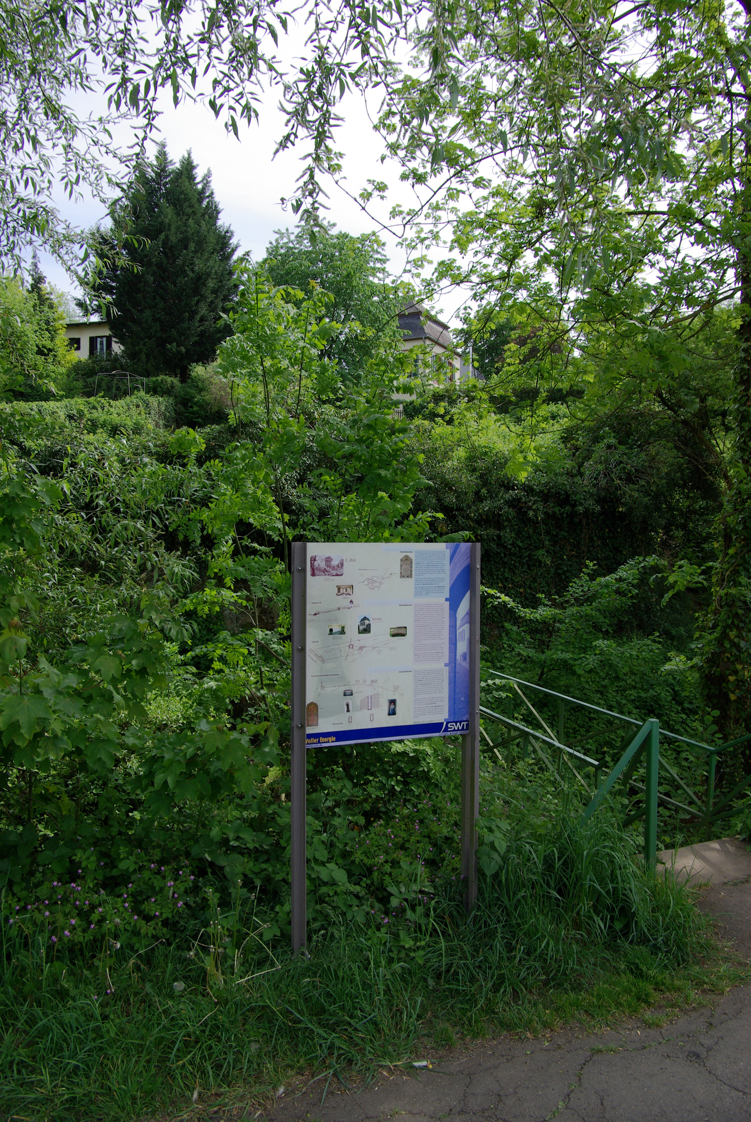 Trier, Standort des ehemaligen Tempel am Herrenbrünnchen, Infotafel